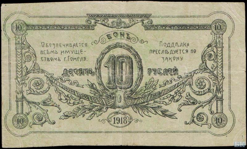 Бон 10 рублей, Гомельское городское самоуправление, 1918, реверс.